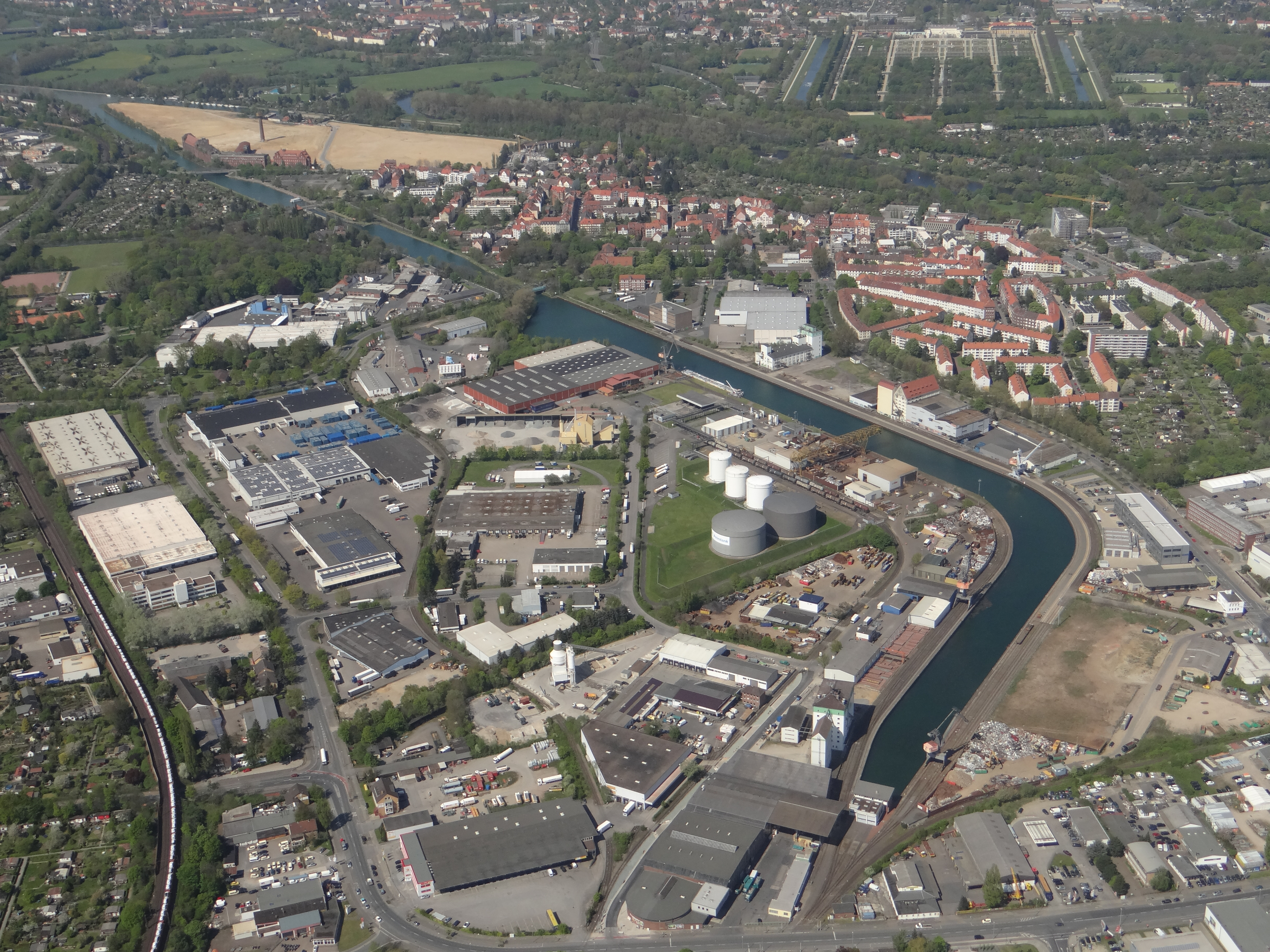 Luftbild des Lindener Hafens